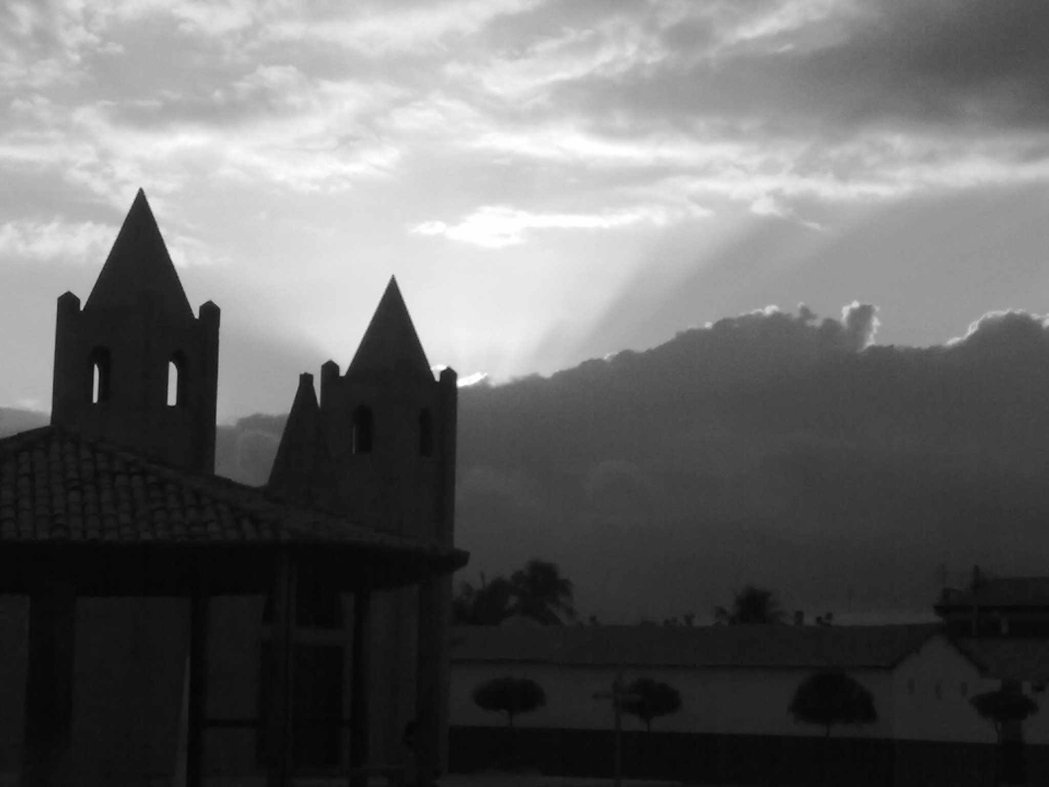 Imagem tirada da Igreja Matriz do Distrito de Guassussê/Orós ano nascer do sol.